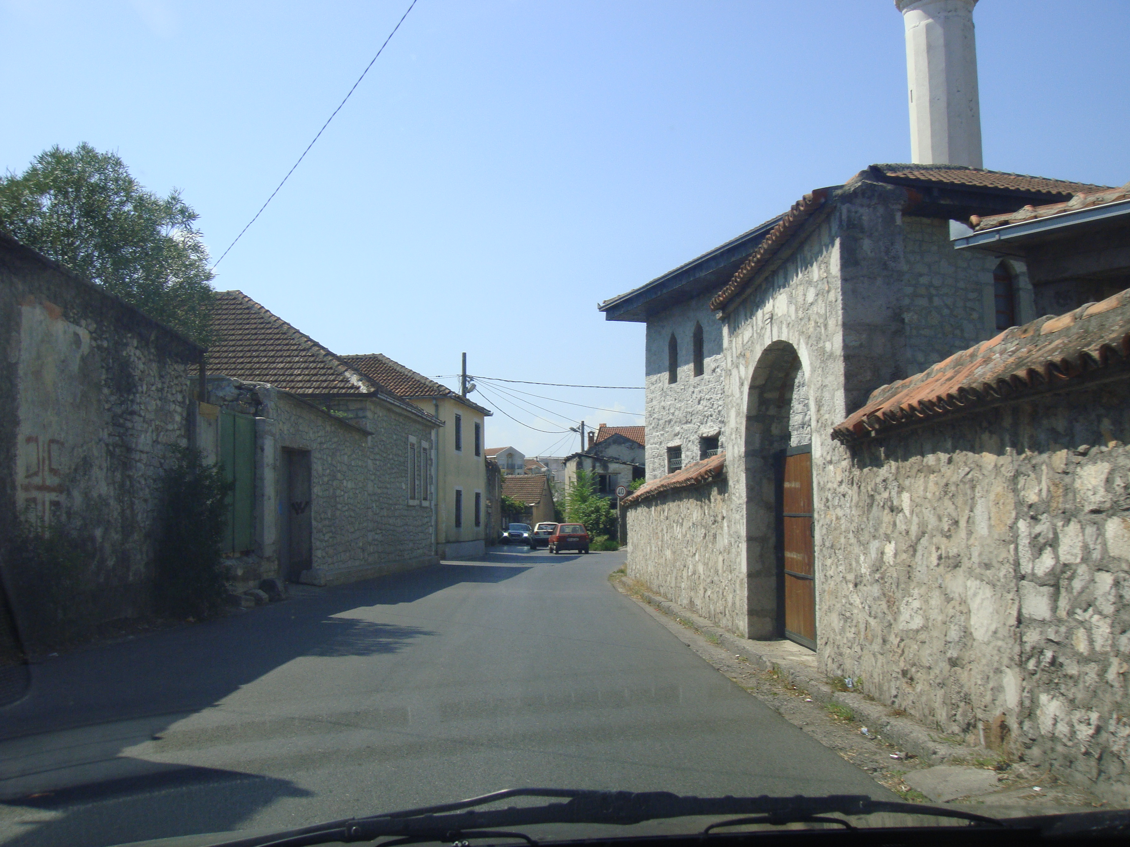 stara varos